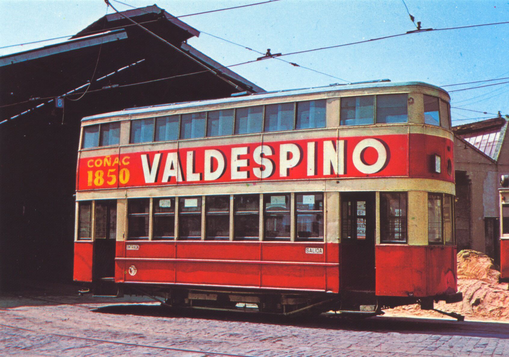 Barcelona Valdespino